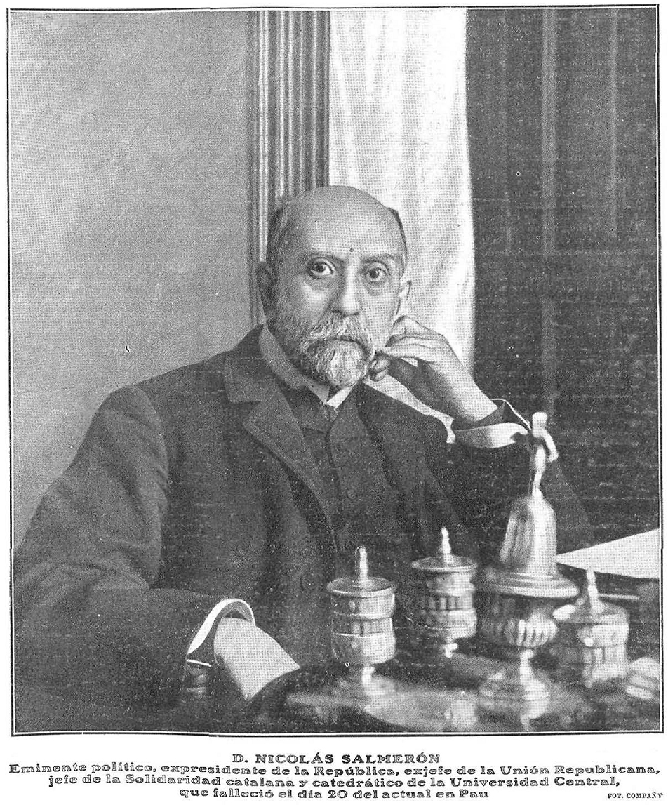 Retrato de Nicolás Salmerón, fotografía de Manuel Compañy recogida en la revista española Nuevo Mundo.